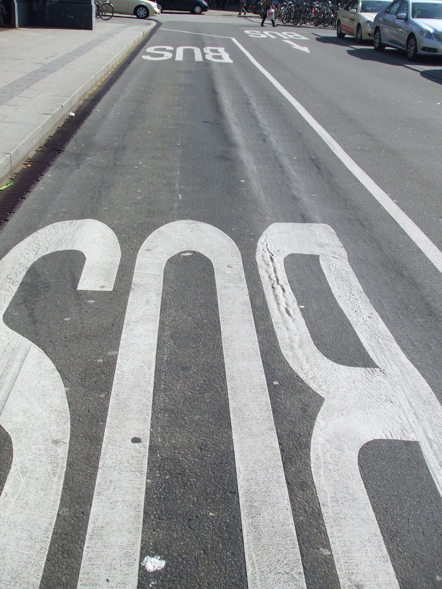 Spurrillen durch Linienbusse in Mannheim